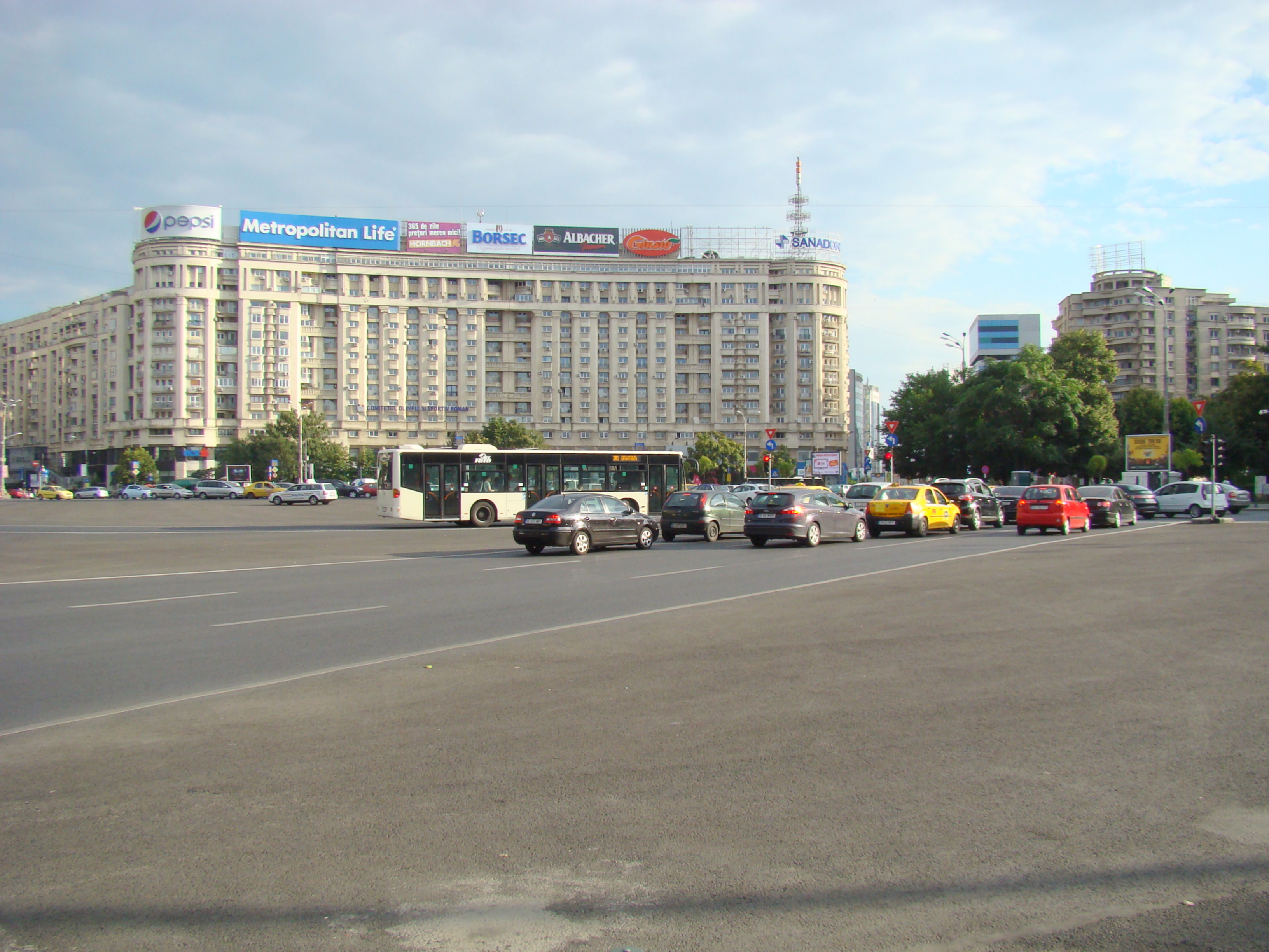 Piața Victoriei din București